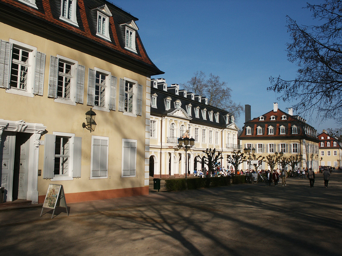 Kuranlage Wilhelmsbad, Hanau